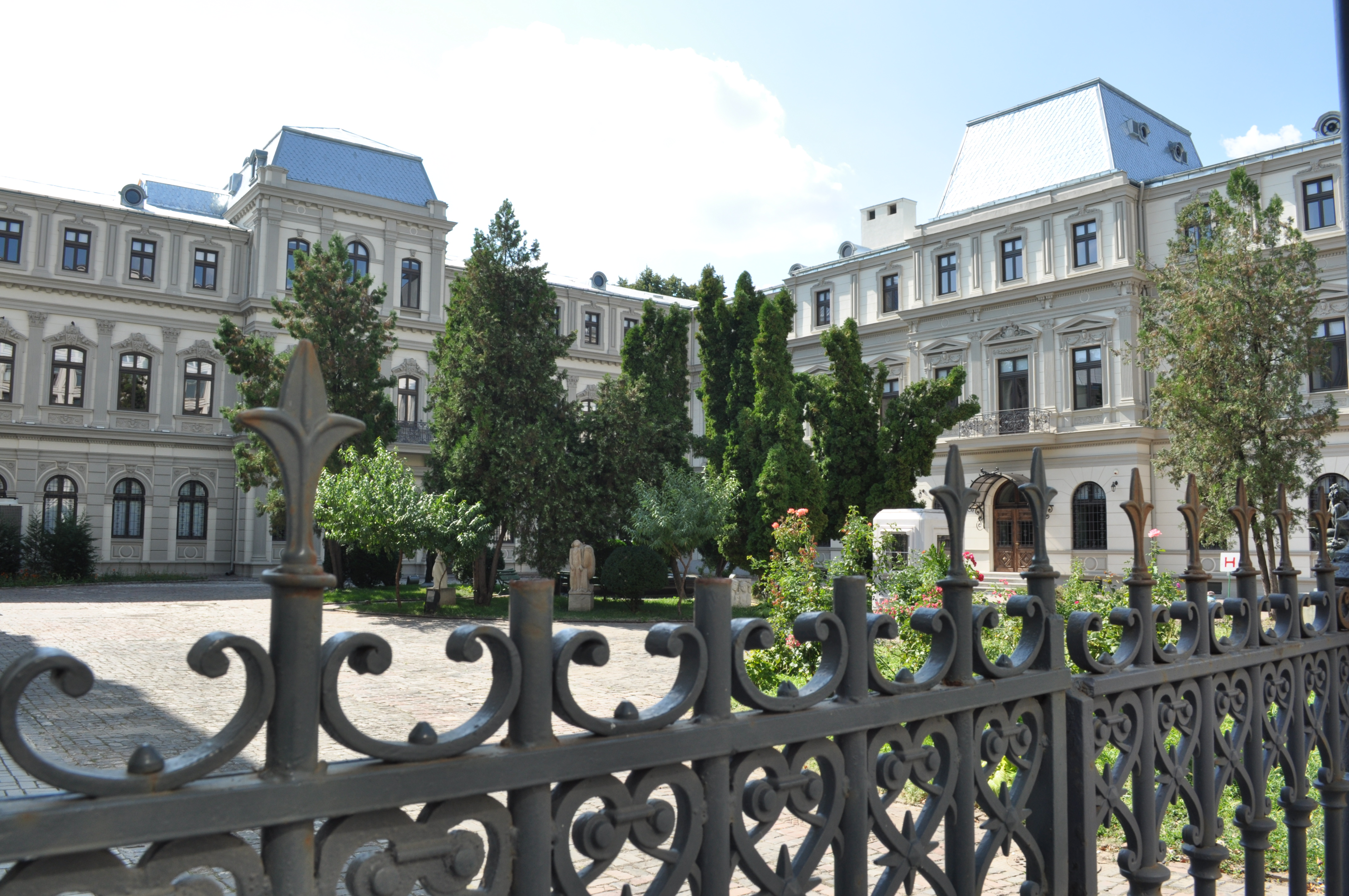 Palatul Romanit - Muzeul Colecțiilor